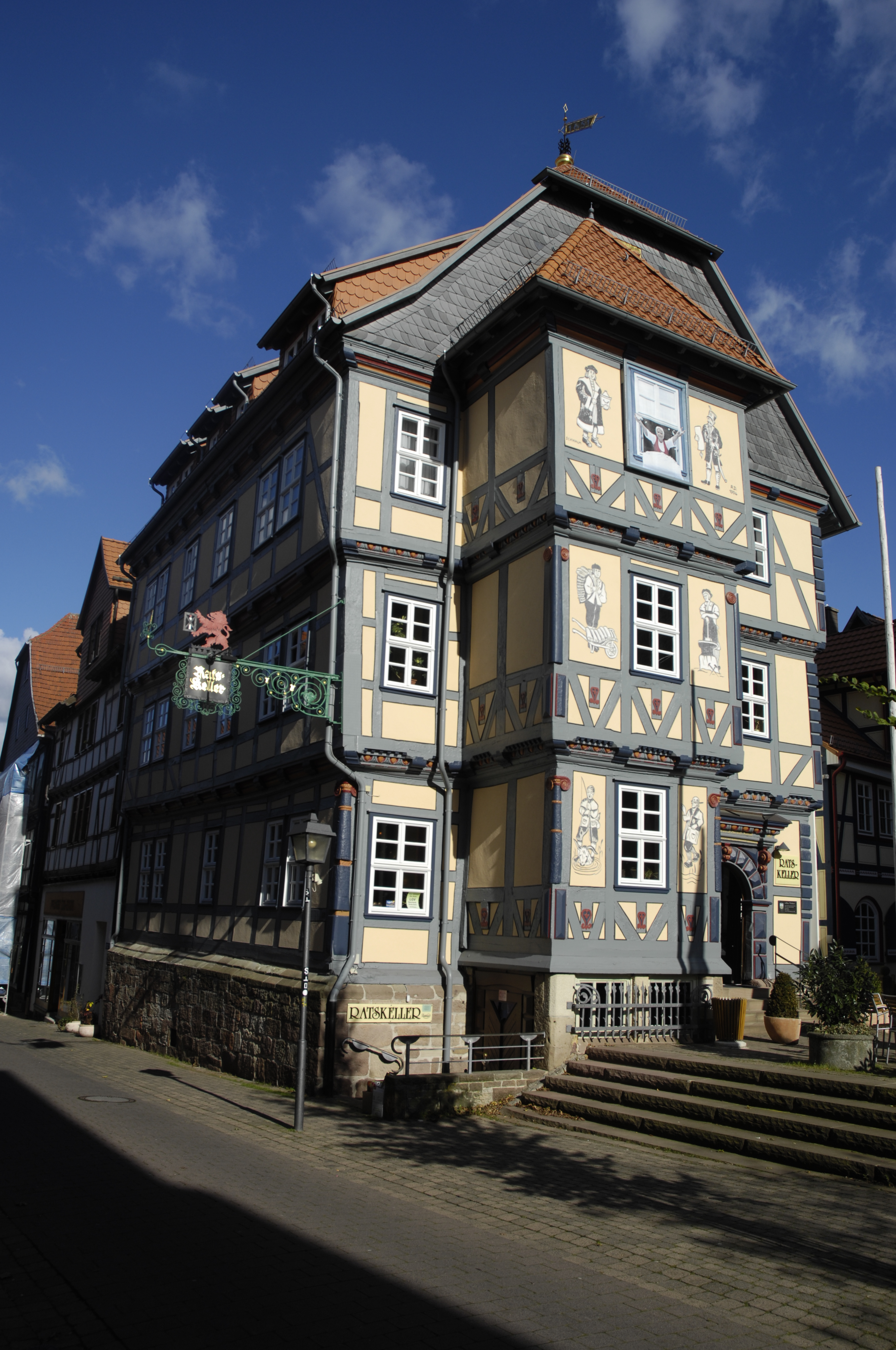 Hessisch Lichtenau, Rathaus